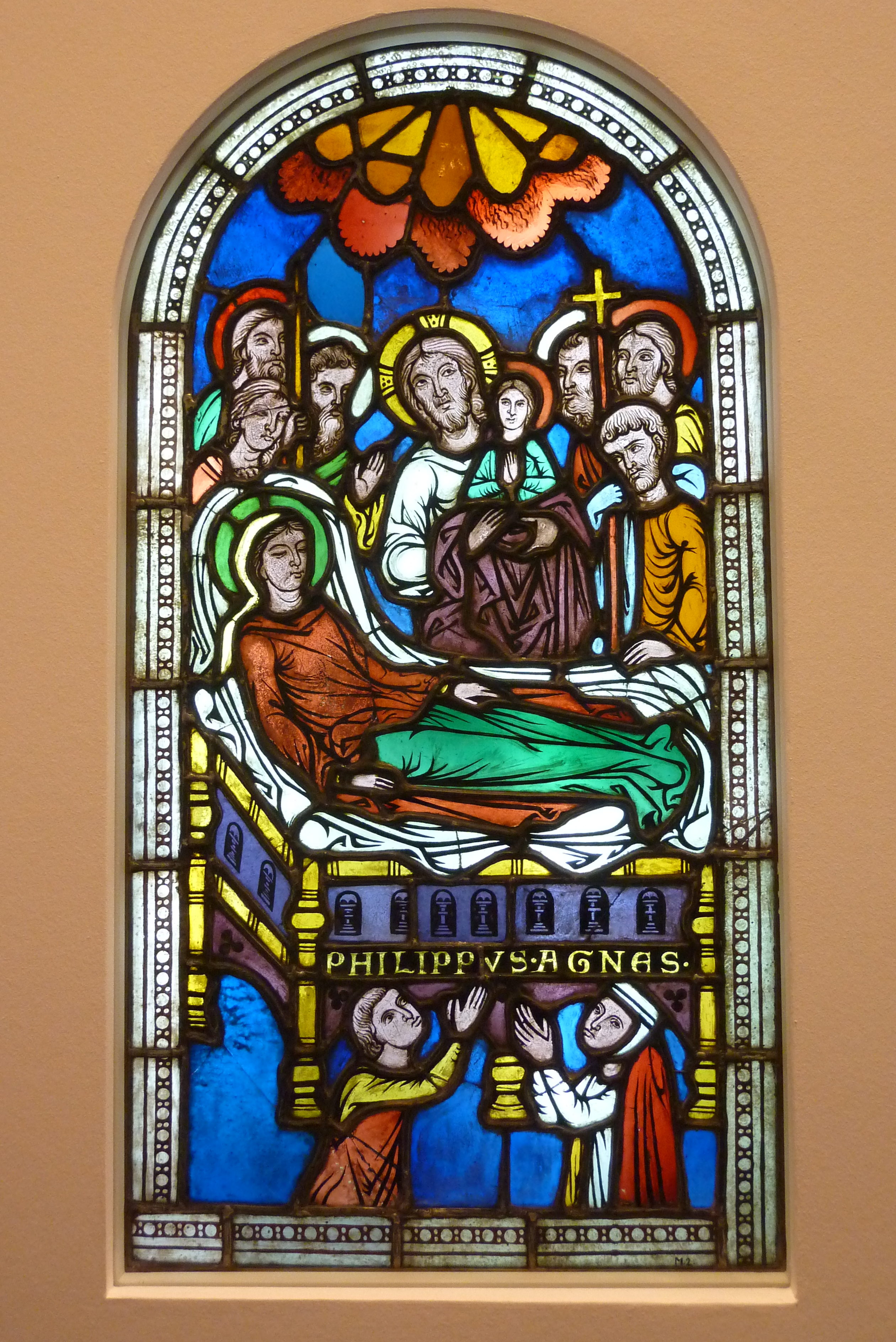 Museum Schnütgen in Köln, Bleiglasfenster mit der Darstellung: Tod Mariens (Inventar-Nr.: M 2)